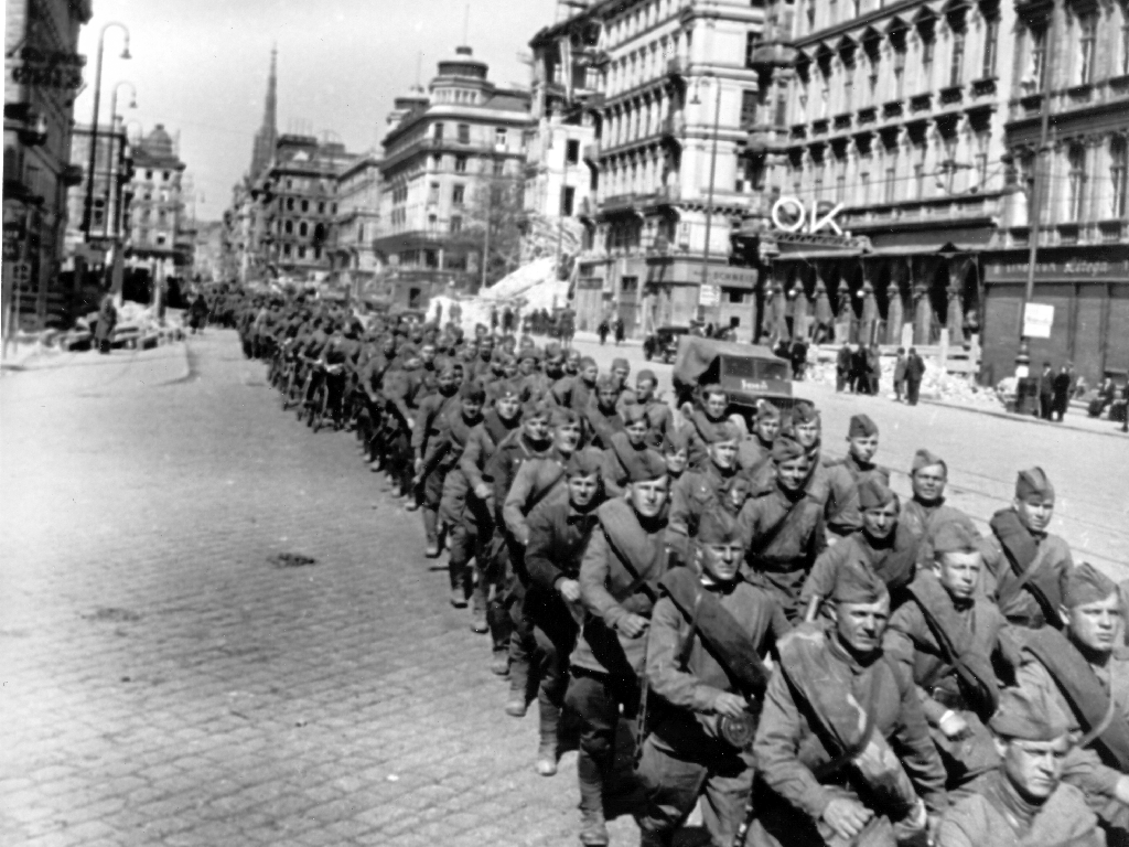 Мирные будни в послевоенной Вене